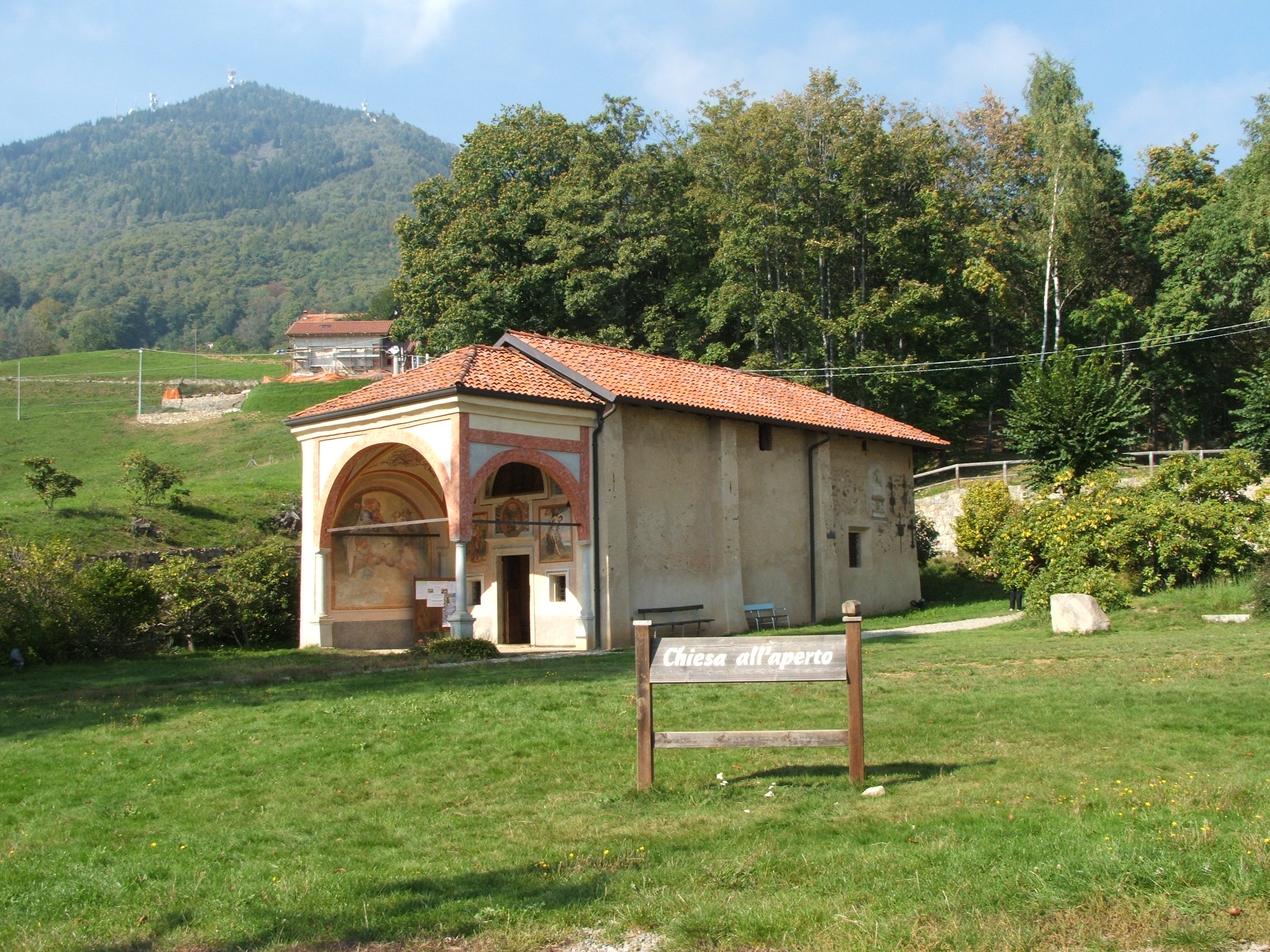 Immagine dal Santuario di Nostra Signora della Brughiera, presso Trivero (provincia di Biella, Piemonte, Italia)